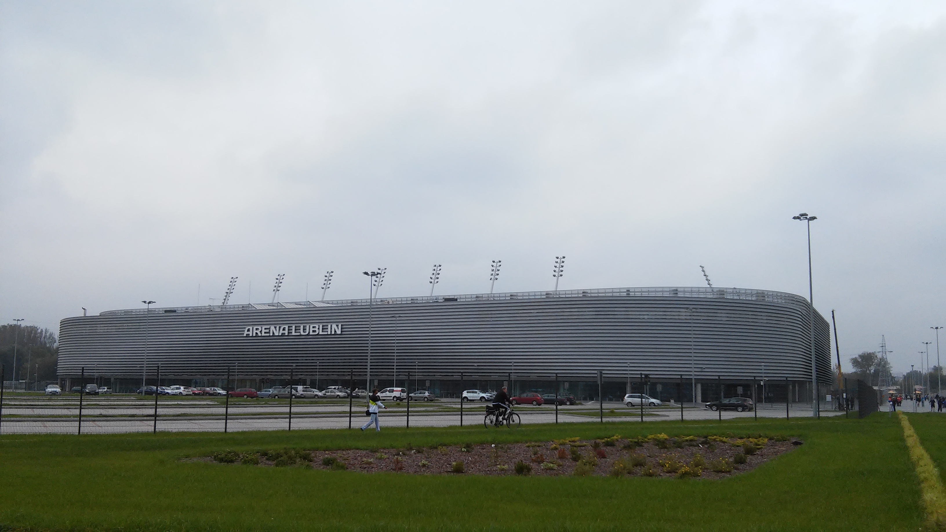 Arena Lublin podczas XI Lubelskiego Festiwalu Nauki.